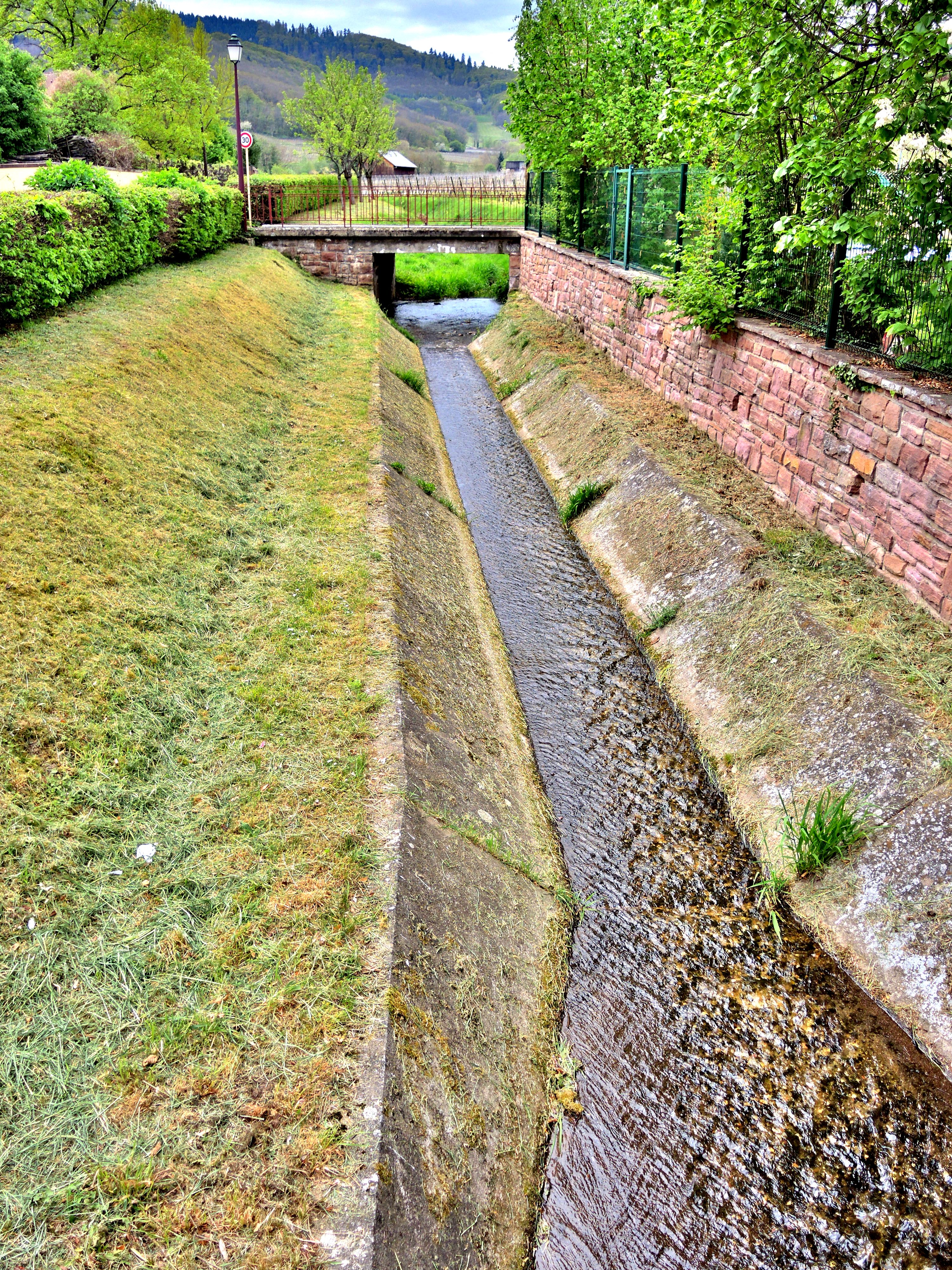 Ruisseau le Walbach, dans la traversée d'Ammerschwihr. Haut-Rhin